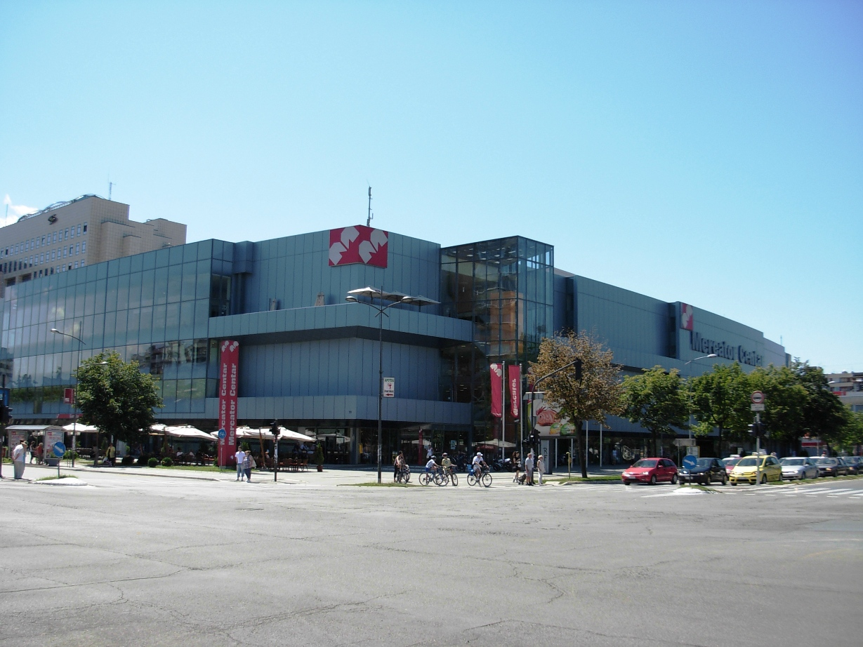 Tržni centar Merkator u Novom Sadu